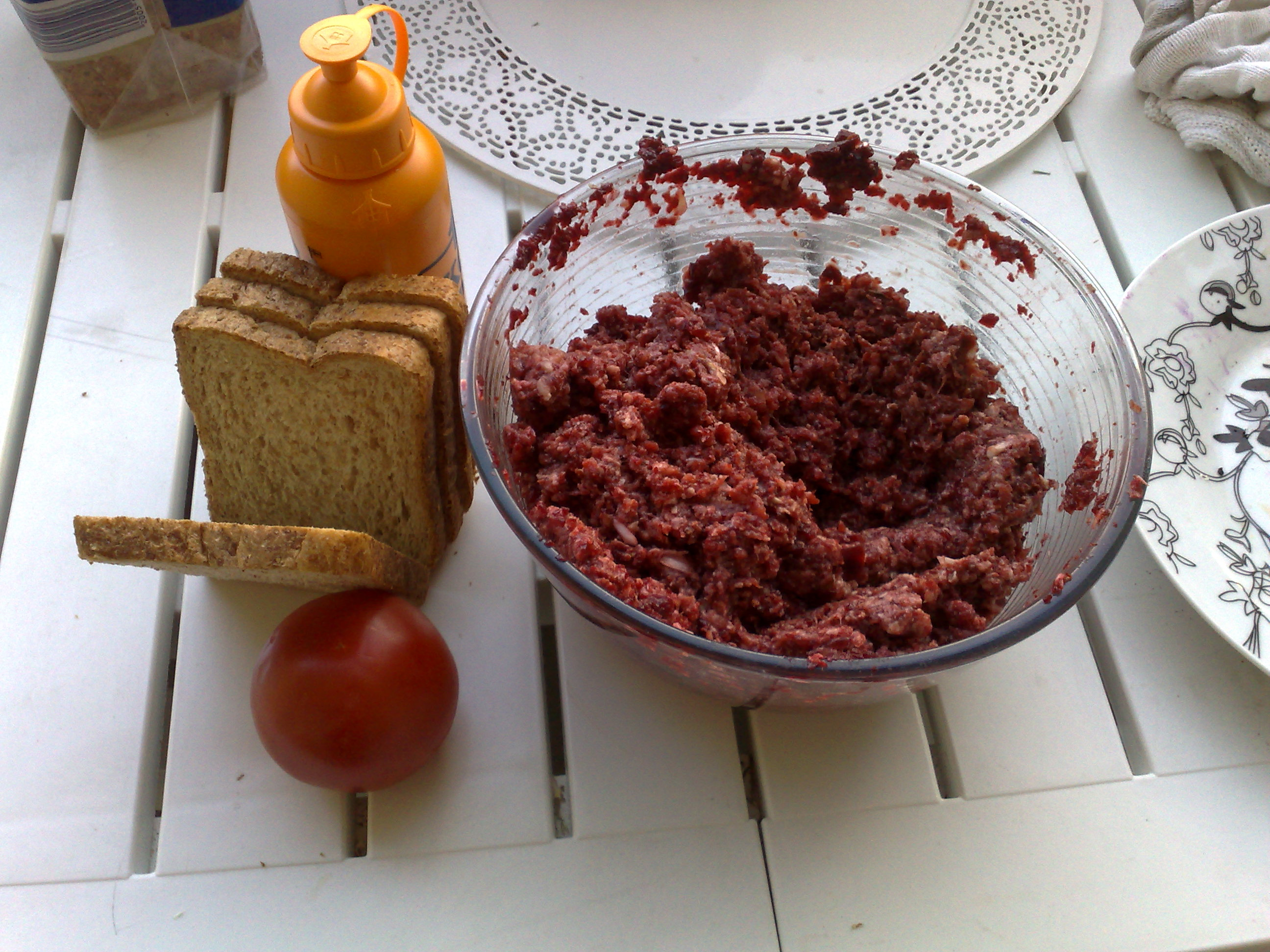 Biff à la Lindström in making